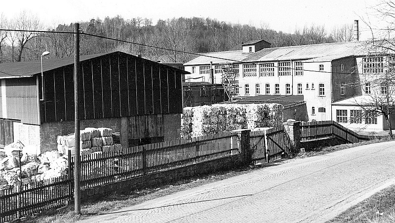 Original image description from the Deutsche FotothekTriebischtal-Munzig-Nieder-Munzig. Pappenfabrik